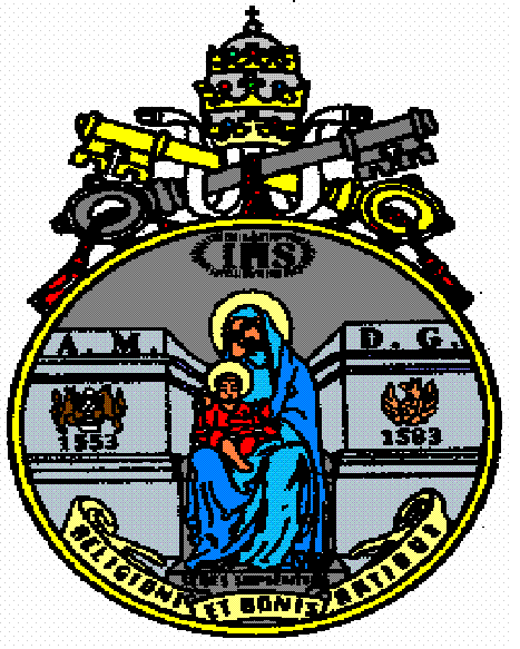 posible coloracion escudo de la pug